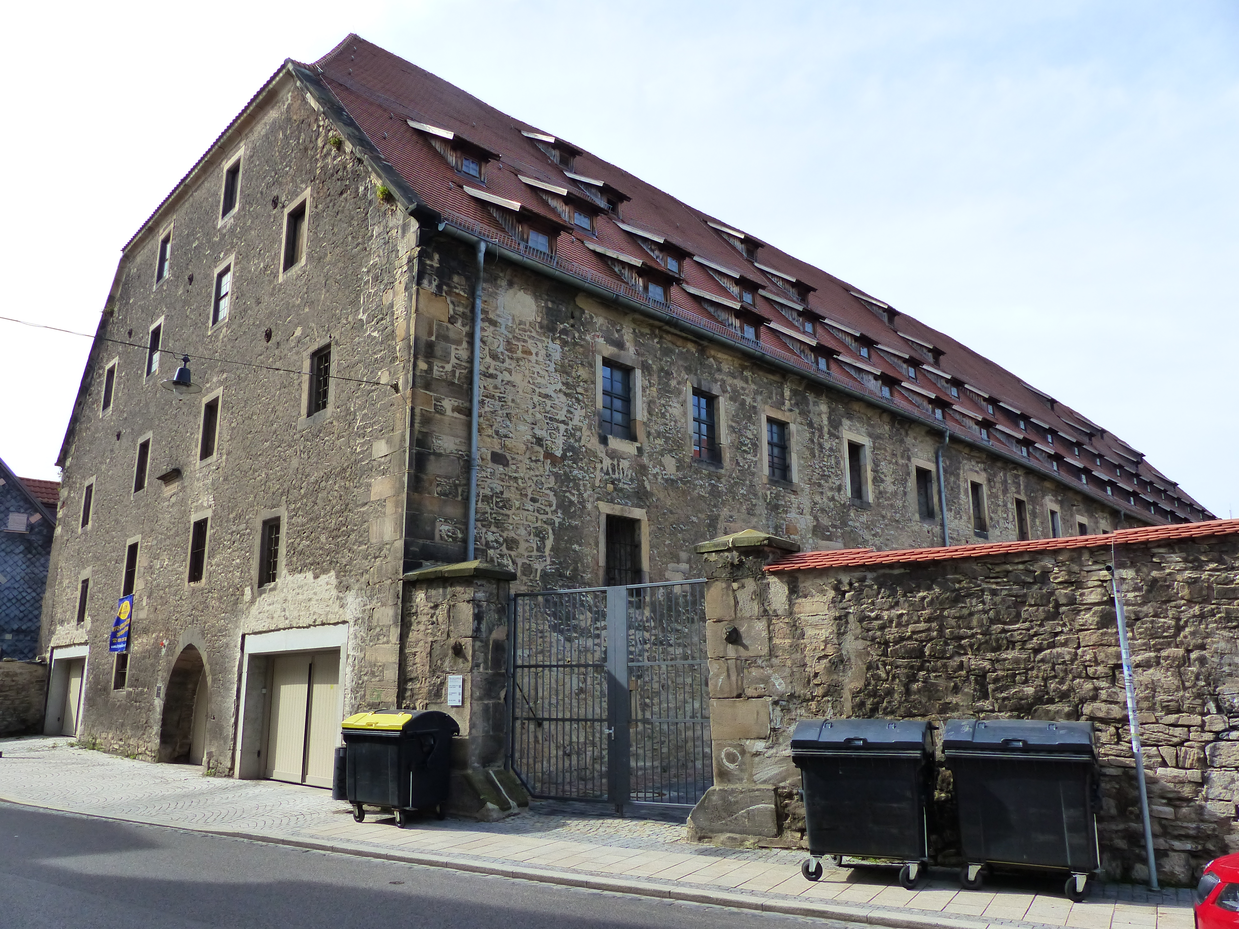 Denkmalgeschützter Speicher, Moritzstraße 12a/Große Ackerhofsgasse 13, Erfurt